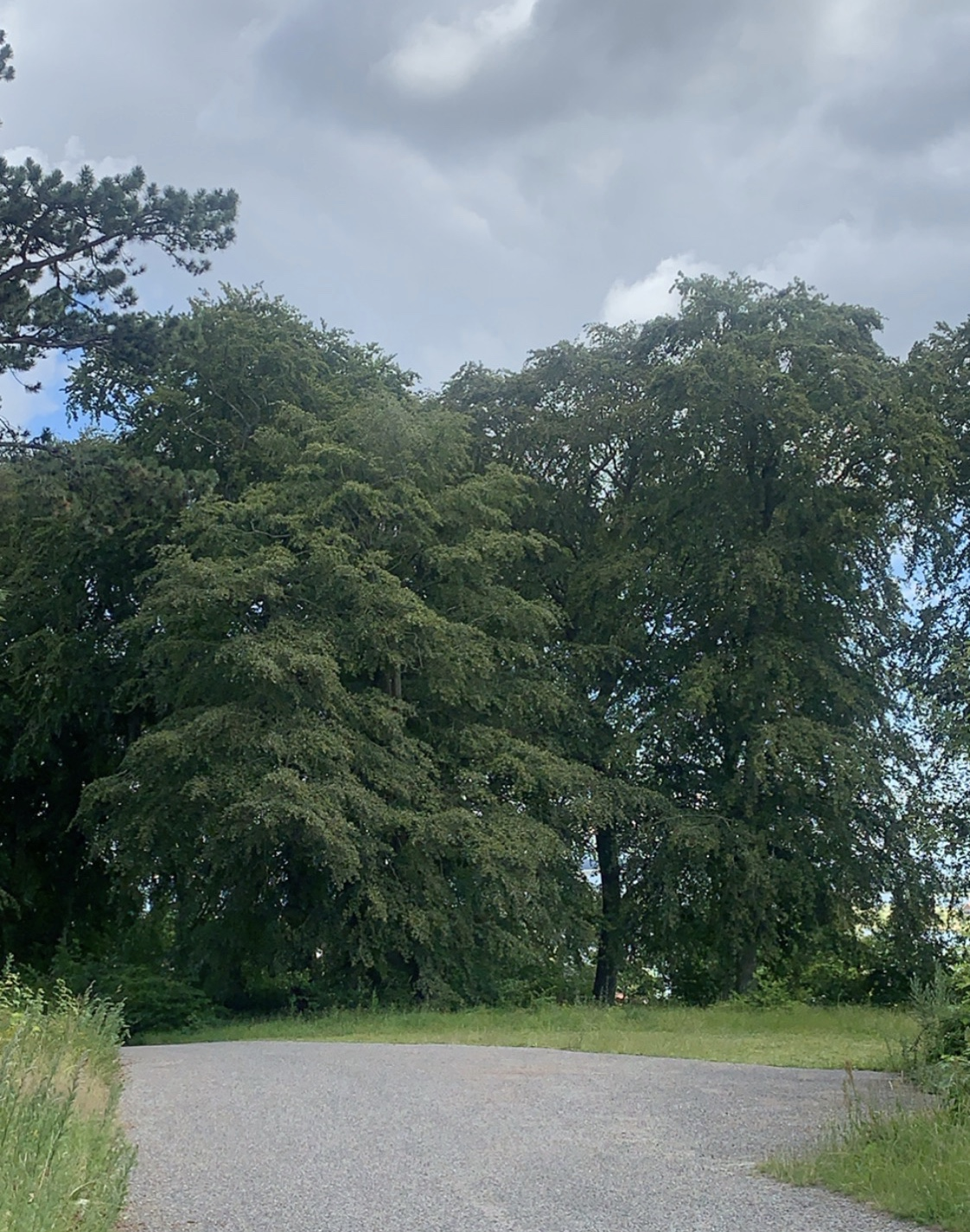 Tyheslund Skov